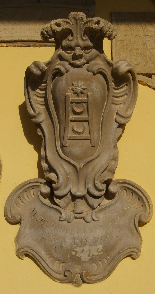 Palazzo pretorio di fiesole, stemma bianciardi 1764